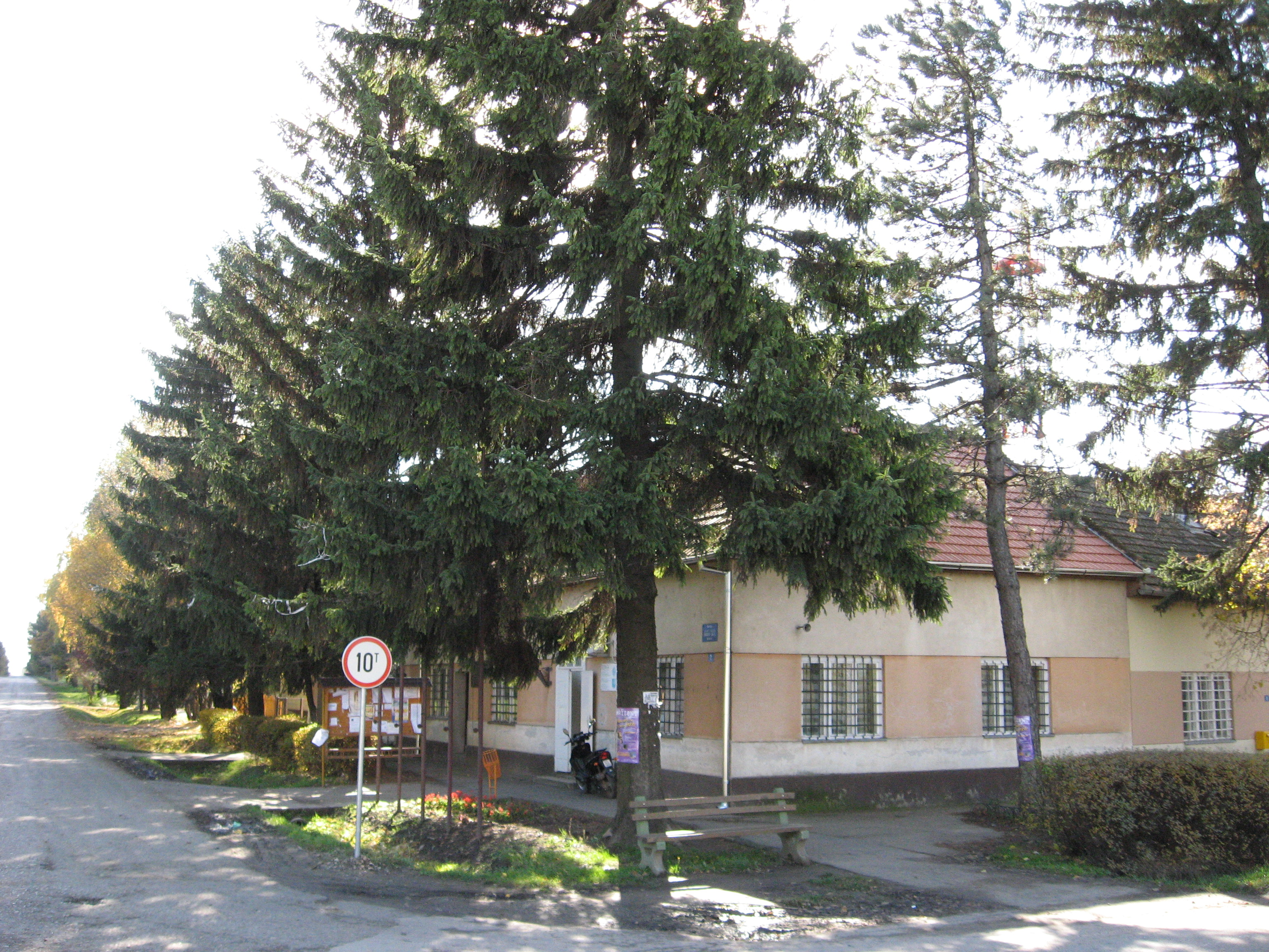 Novo Orahovo